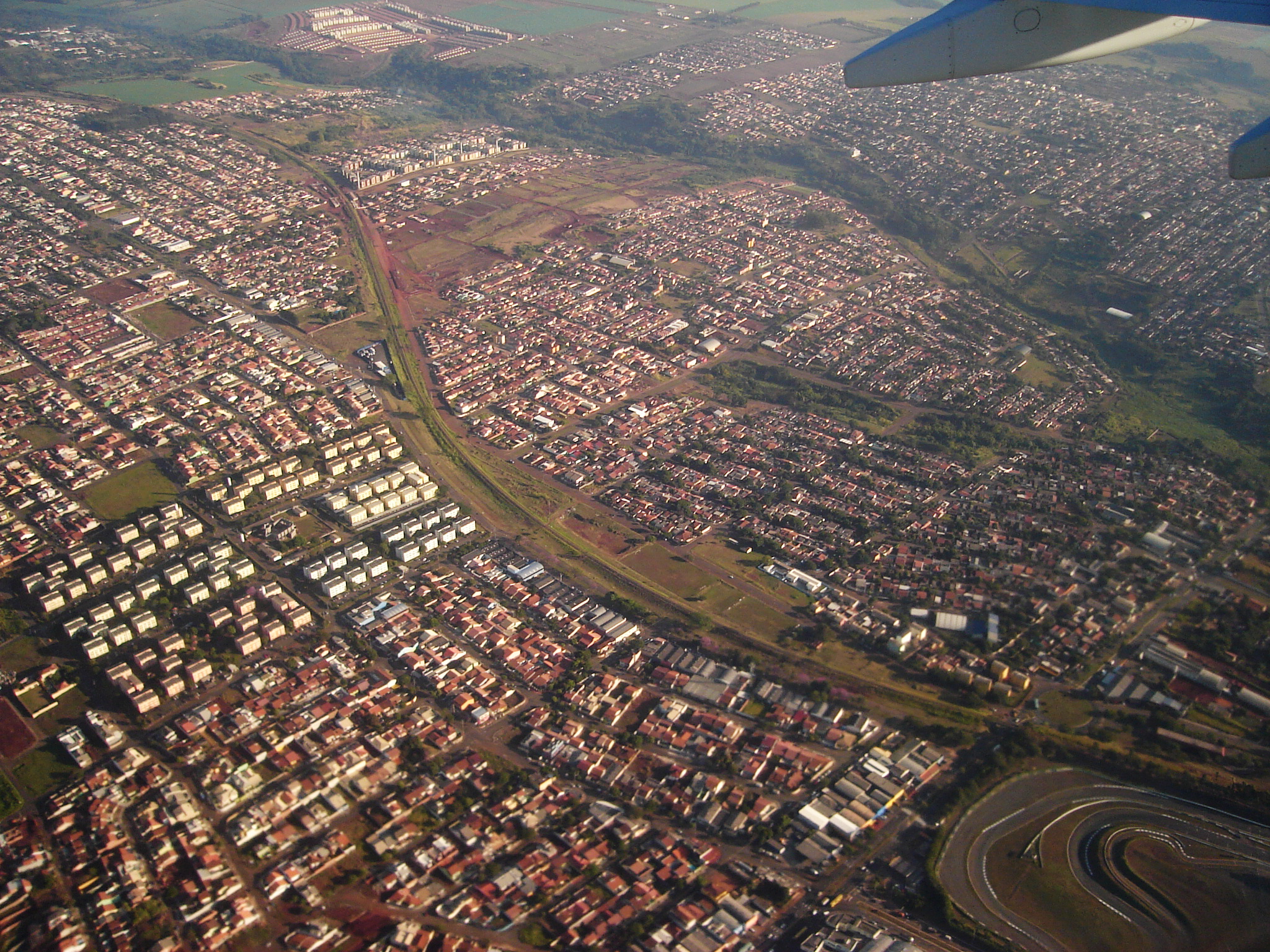 Fotografia aérea de Londrina, Paraná, Brasil.